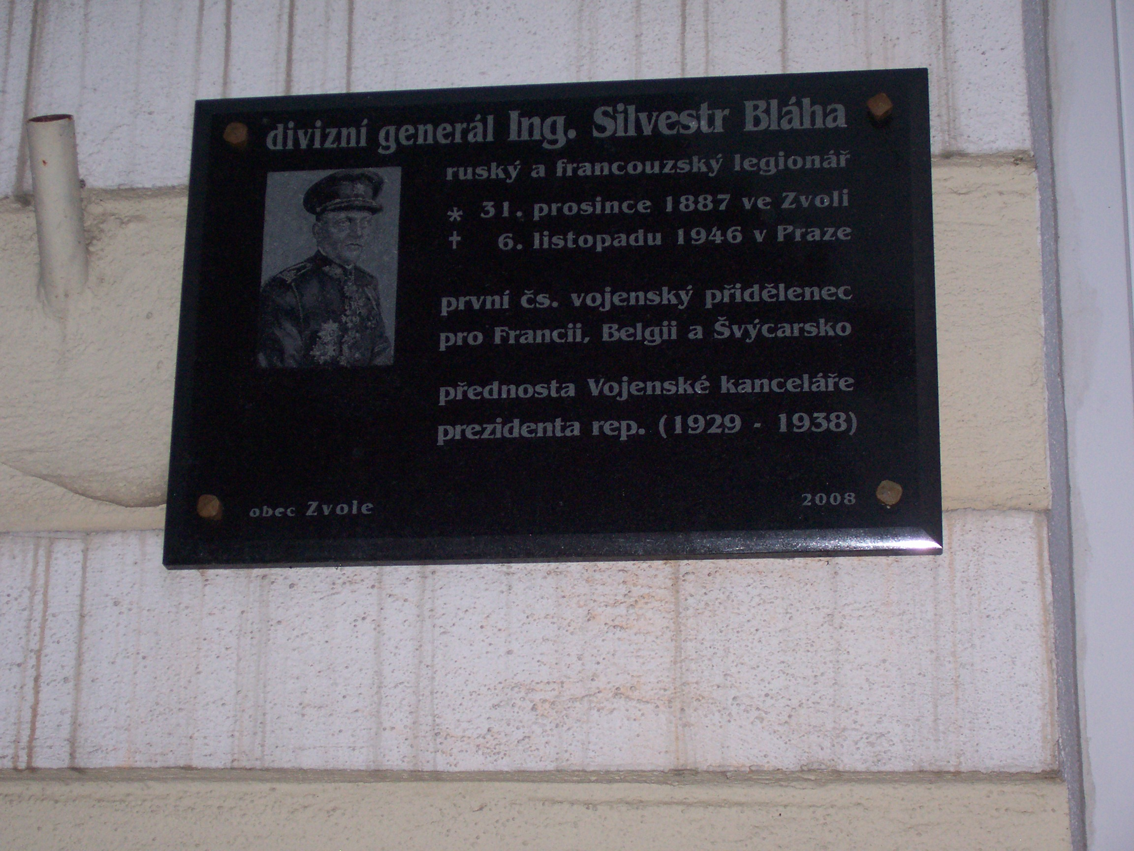 fotografie